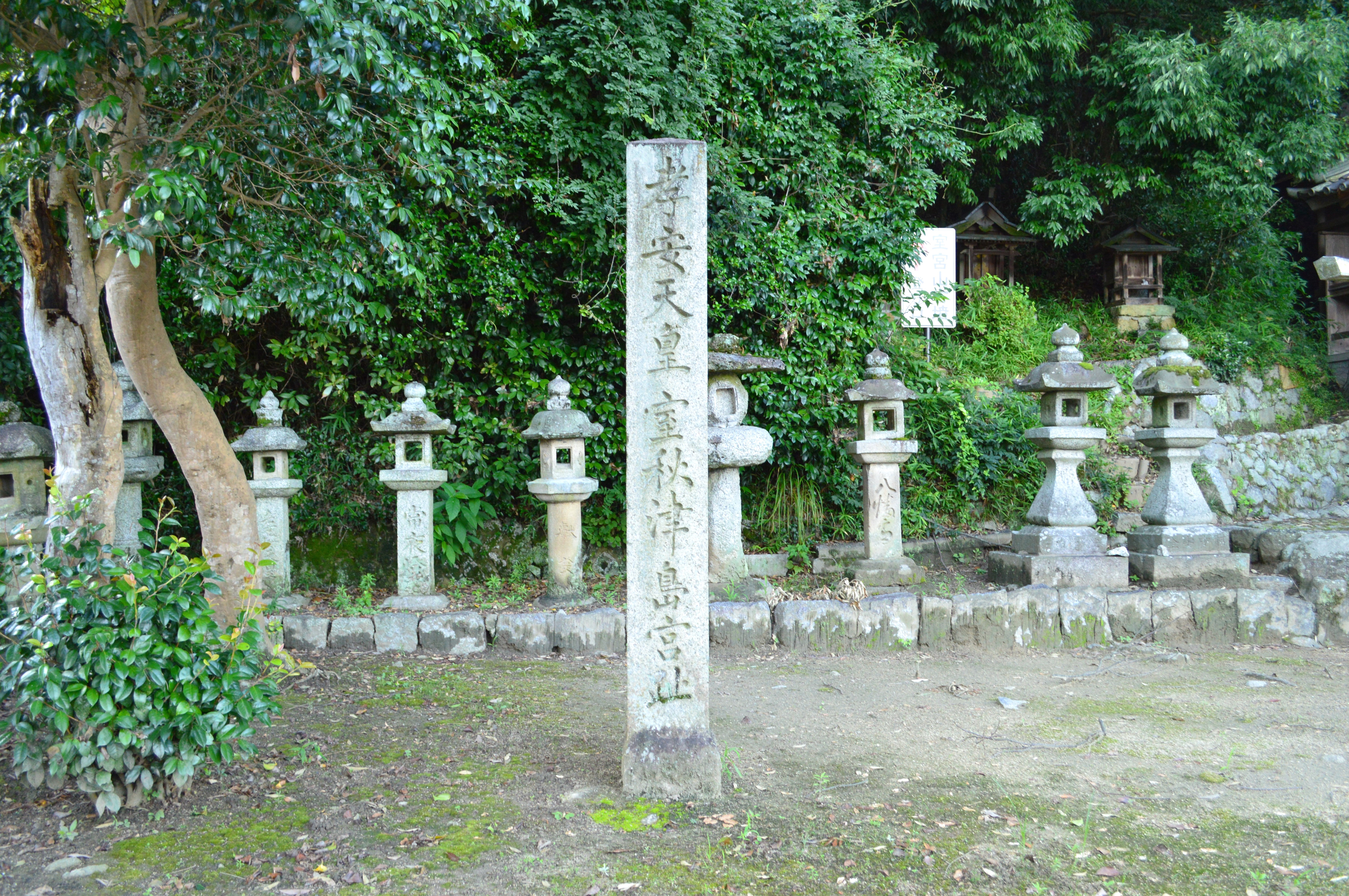 孝安天皇室秋津島宮阯碑